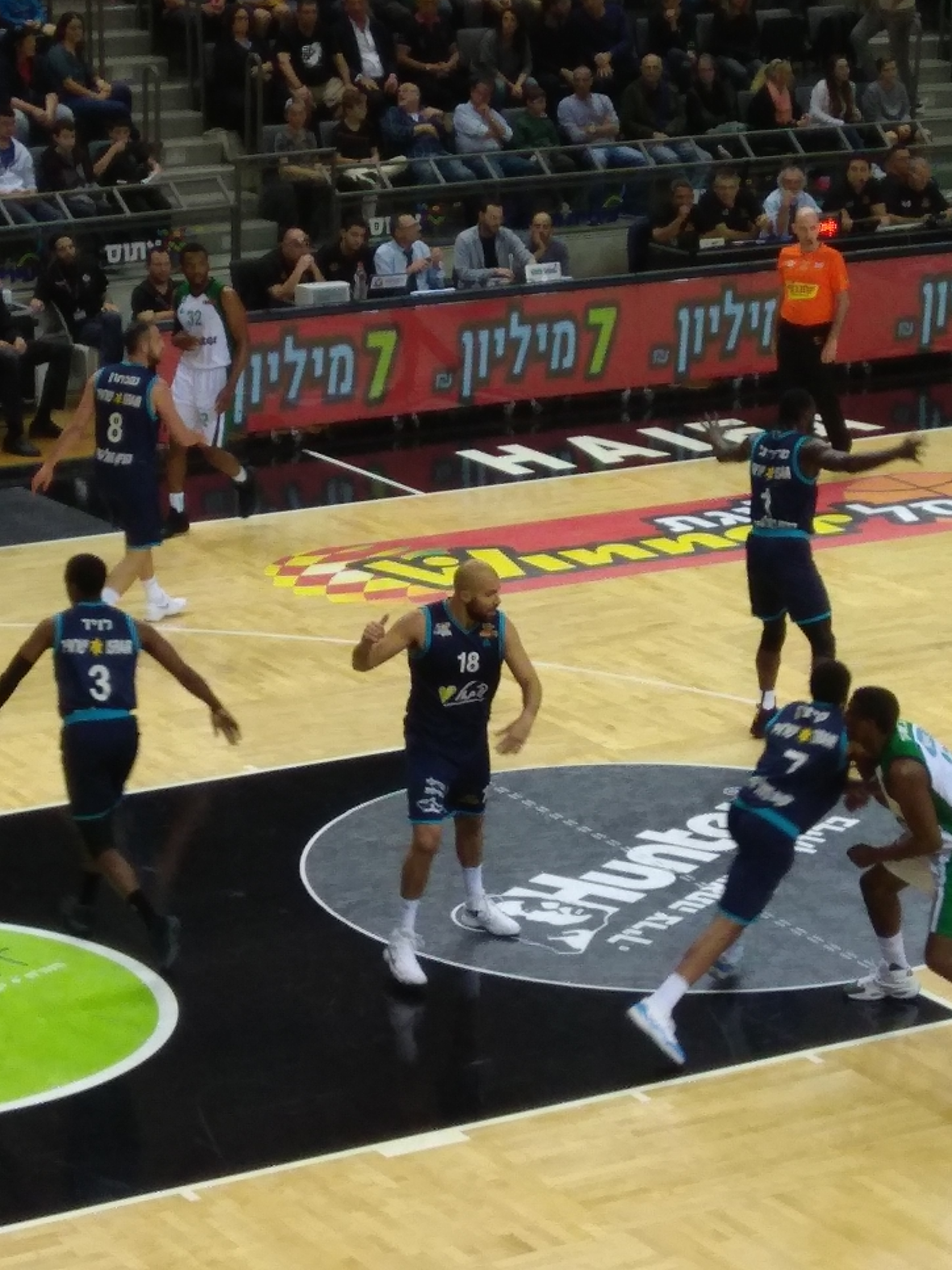 הפועל אילת, 2018